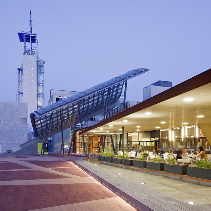 Landesmuseum Niederösterreich, Eingangsseite mit Klangturm